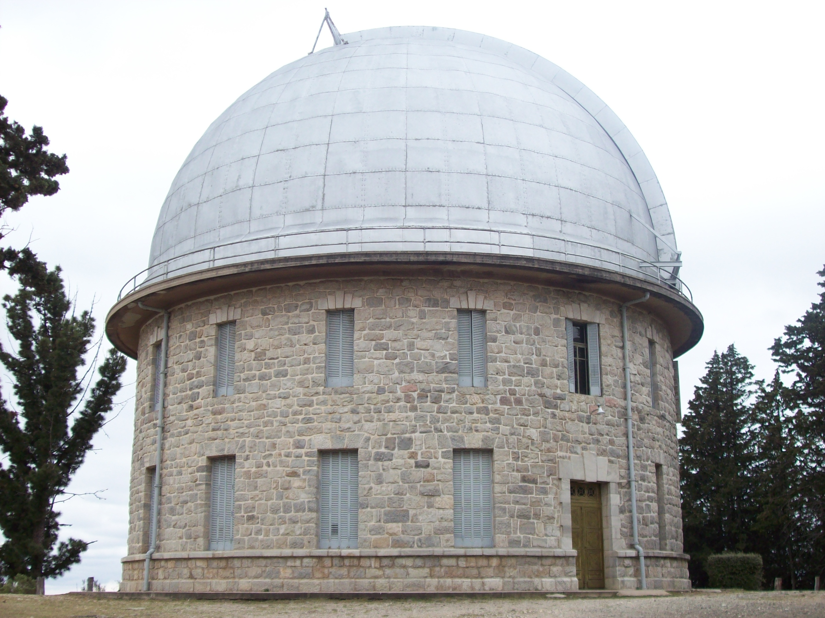 Observatorio de Bosque Alegre, en la provincia de Córdoba, Argentina.